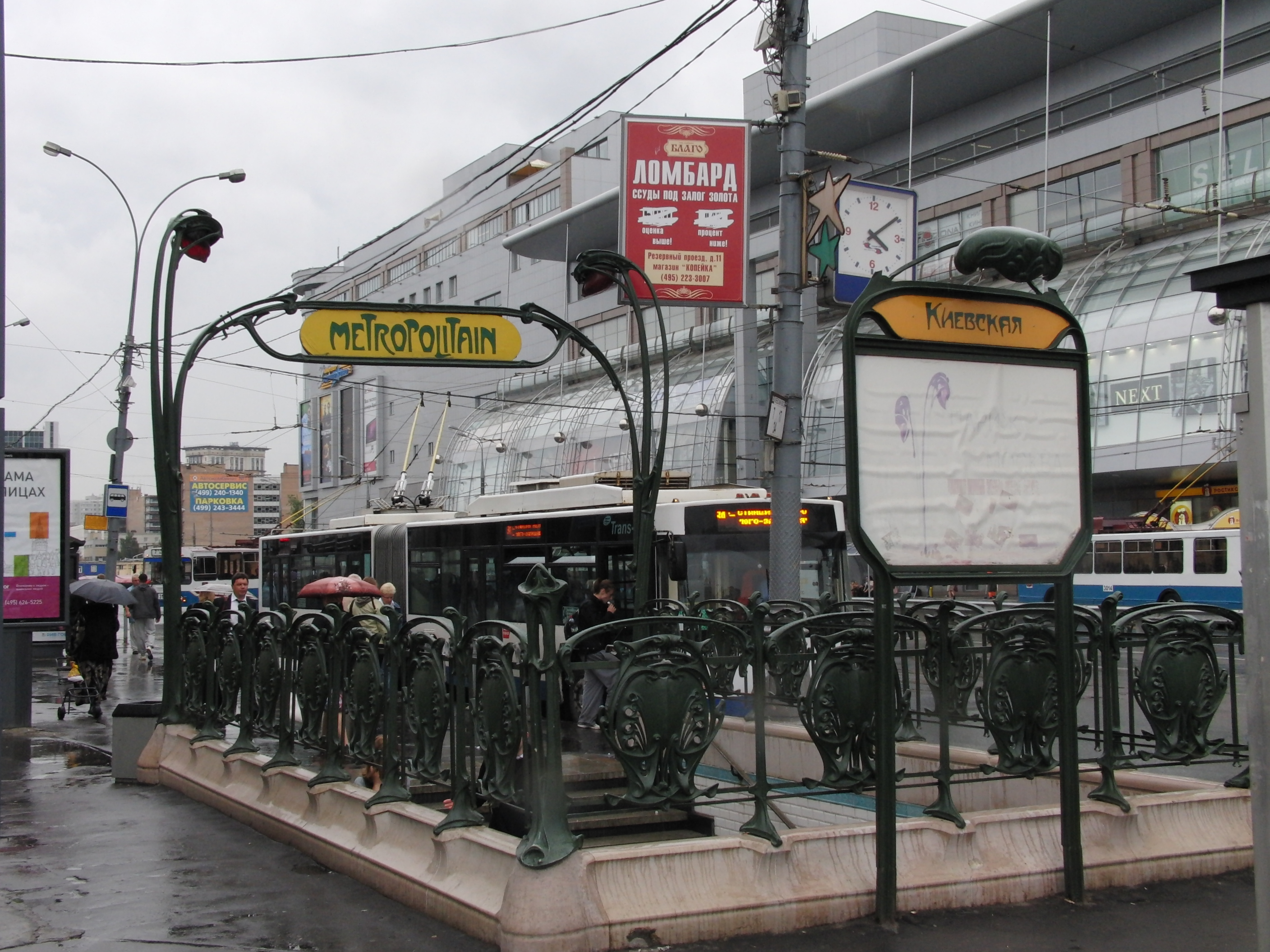 Kievskaya stations, Paris Metro style entry (Вход на станции Киевская в стиле Парижского метро)